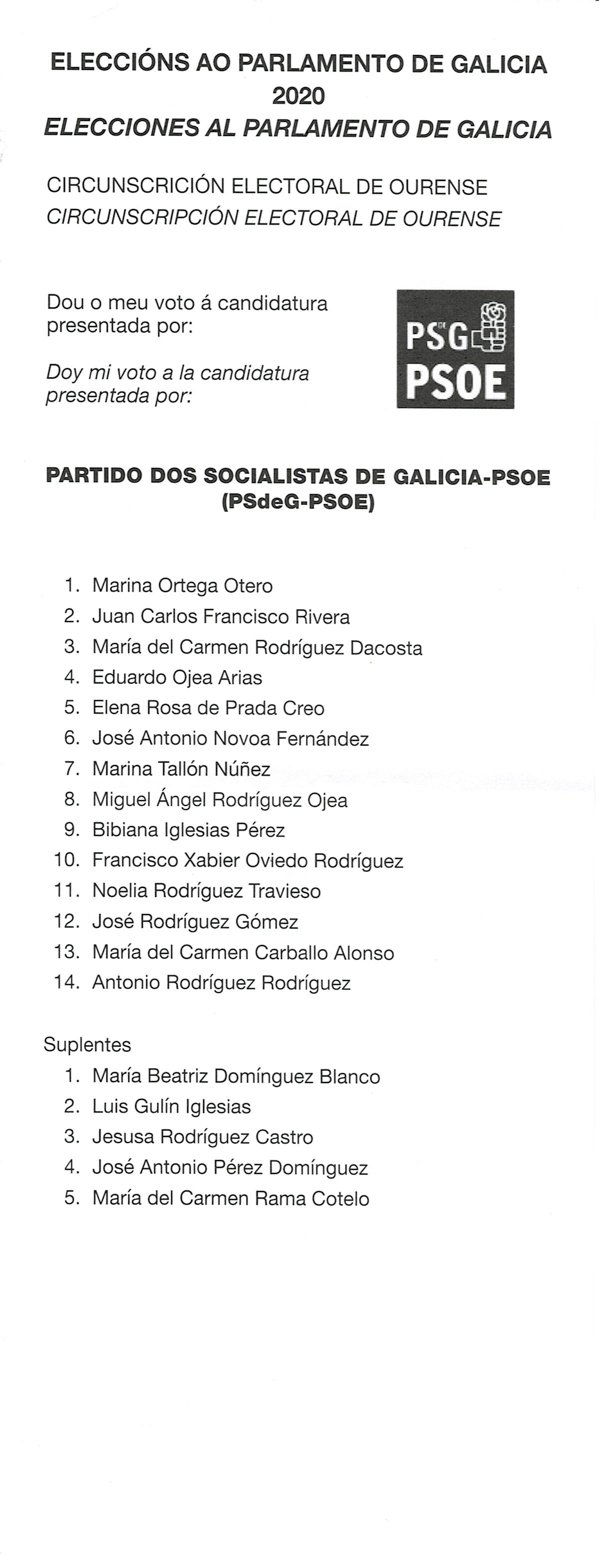 Papeletas electorais Eleccións ao Parlamento de Galicia 2020 circunscrición electoral de Ourense - xullo - PSdeG-PSOE